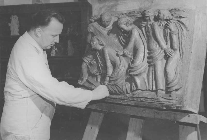 Pater R. Rats O.F.M. bezig met boetseren van een kruiswegstatie in het Klei-atelier Brunssum (KAB). Zie artikel in bedrijfsblad Steenkool kerstnummer 1947, p. 479-481.